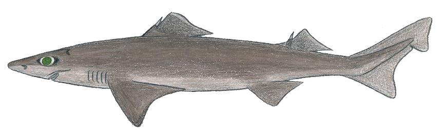 Centrophorus tesselatus